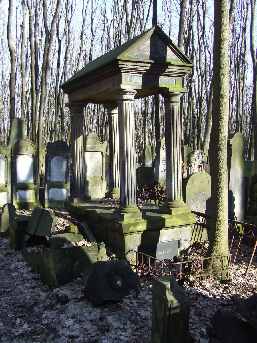 Cmentarz Żydowski na Powązkach, Warszawa, nagrobek